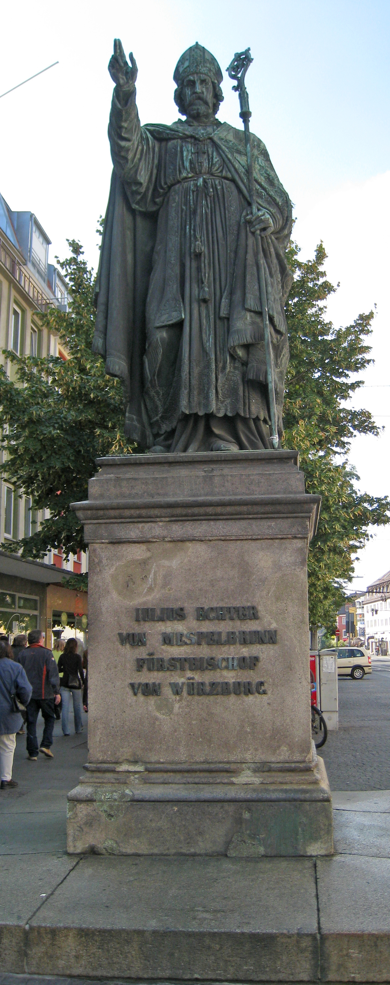 Statue des Julius Echter von Mespelbrunn. Gegenüber dem Juliusspital in Würzburg an der Juliuspromenade vom Münchner Bildhauer Max von Widnmann